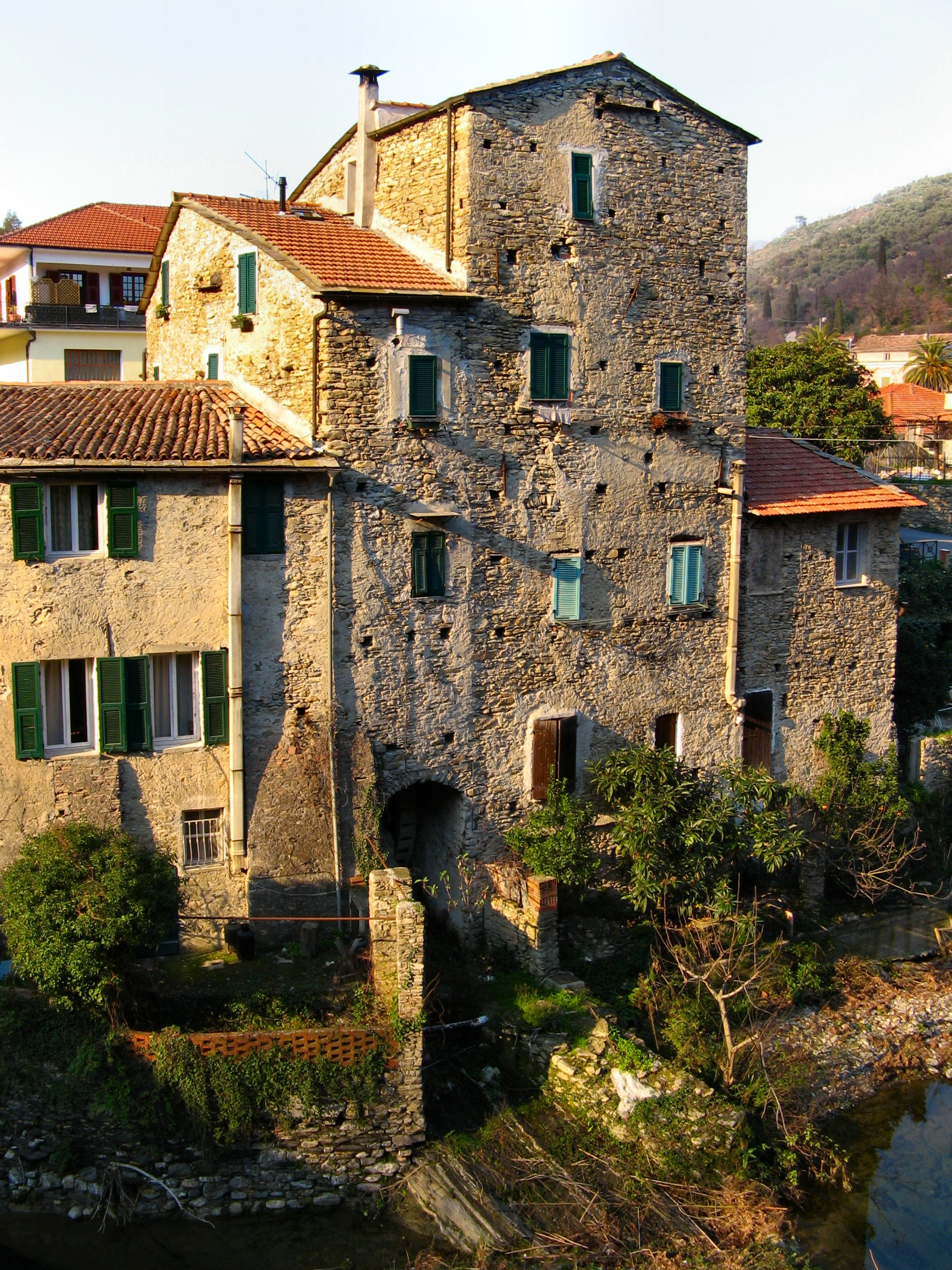 Un antico frantoio per le olive, Dolcedo, Imperia, Italy